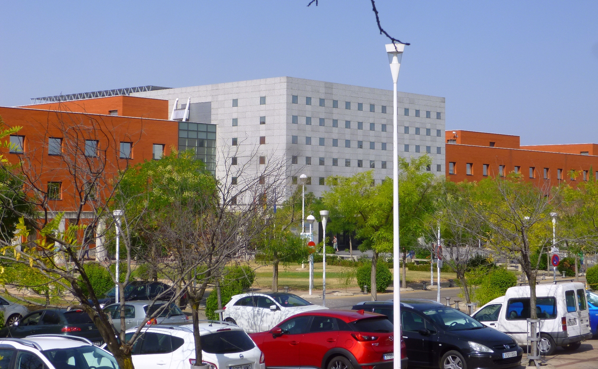 Alcorcón - Hospital Universitario Fundación Alcorcón (HUFA, adscrito al SERMAS)